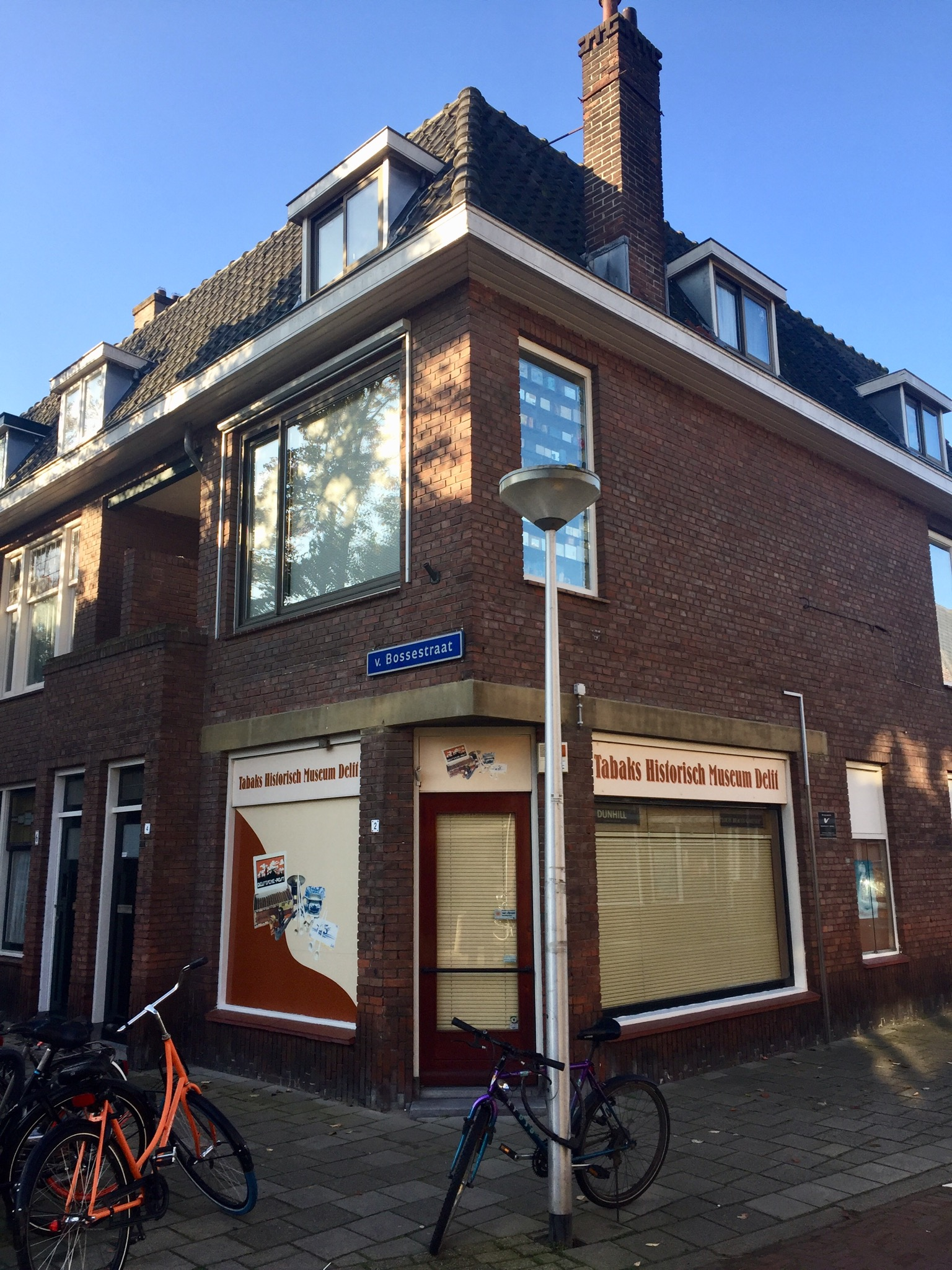 Sede do Museo Histórico do Tabaco de Delft, nos Países Baixos.